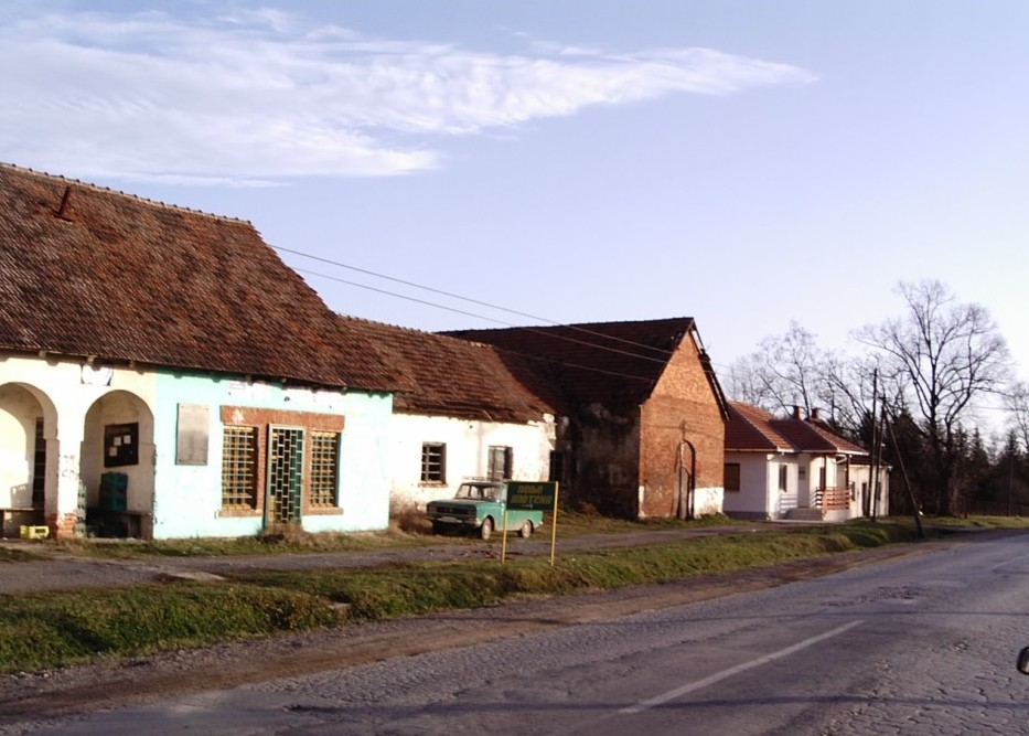 Средиште Мургаша.